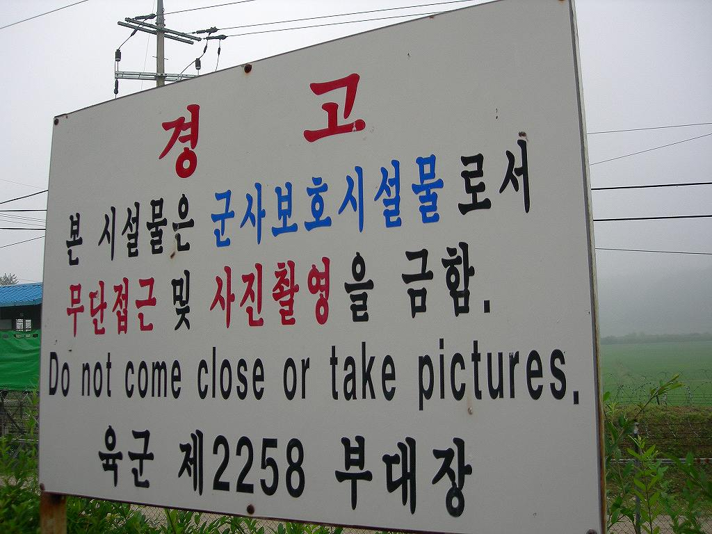 臨津閣における写真撮影禁止の警告